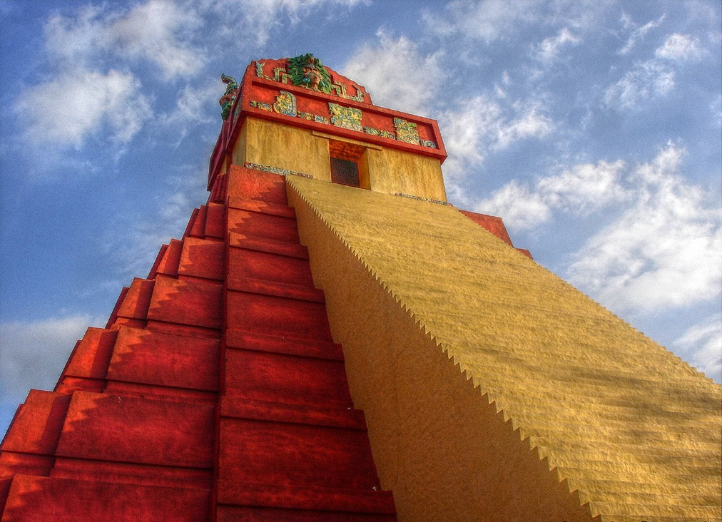 Replica del templo maya de Tikal. Este ubicada en el parque Xetulul